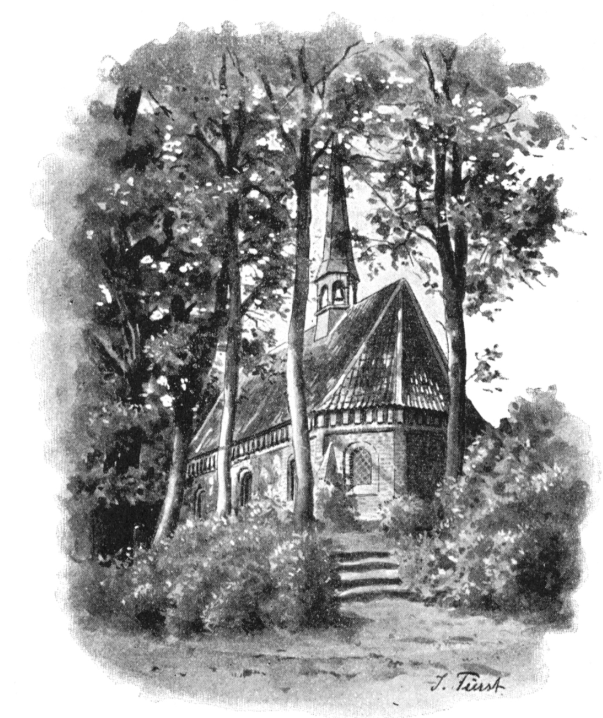 Die Kirche von Sankt Annen, Zeichnung von Julius Fürst um 1895